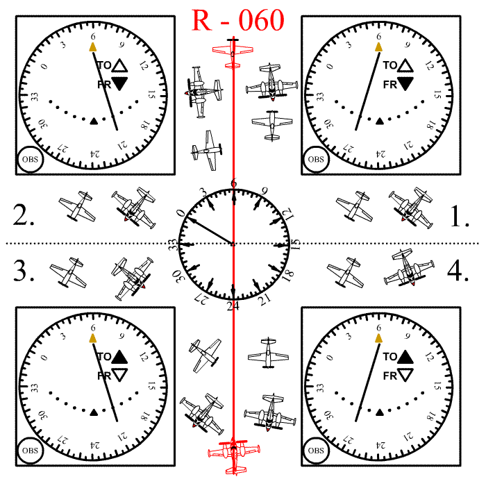 VORstefan15A